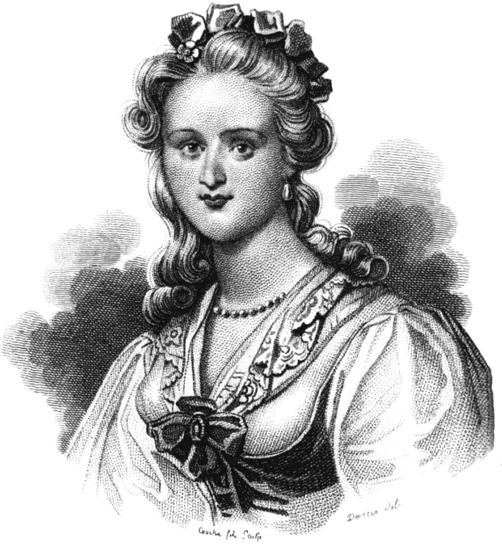 Gravue de Marie-Jeanne Riccoboni par Couché fils, dans le tome premier des Œuvres de Mme Riccoboni